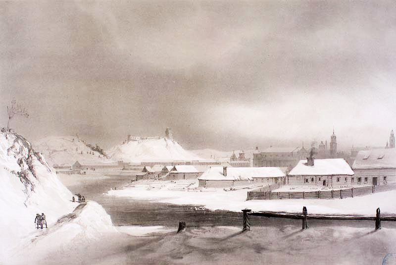 Aquarel of Žvejai suburb, Vilnius